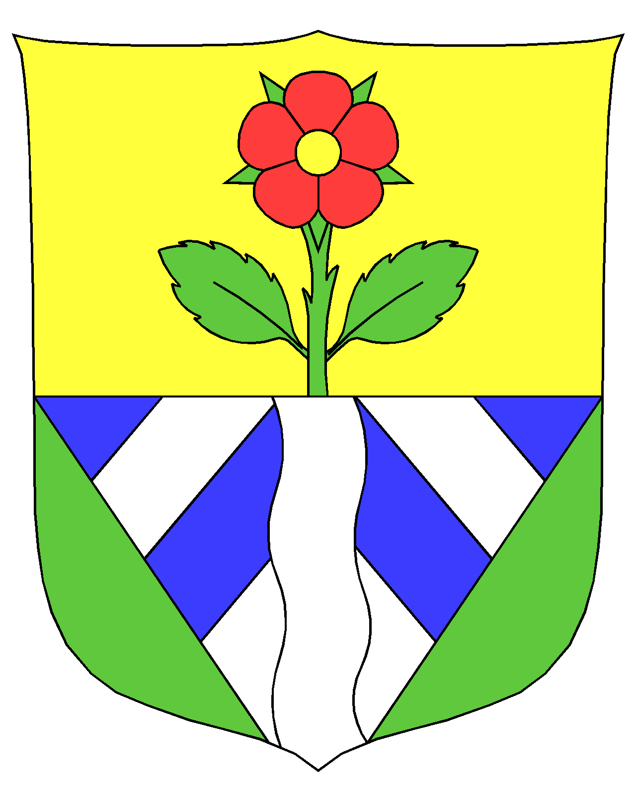 Das Wappen der Gemeinde Fieschertal